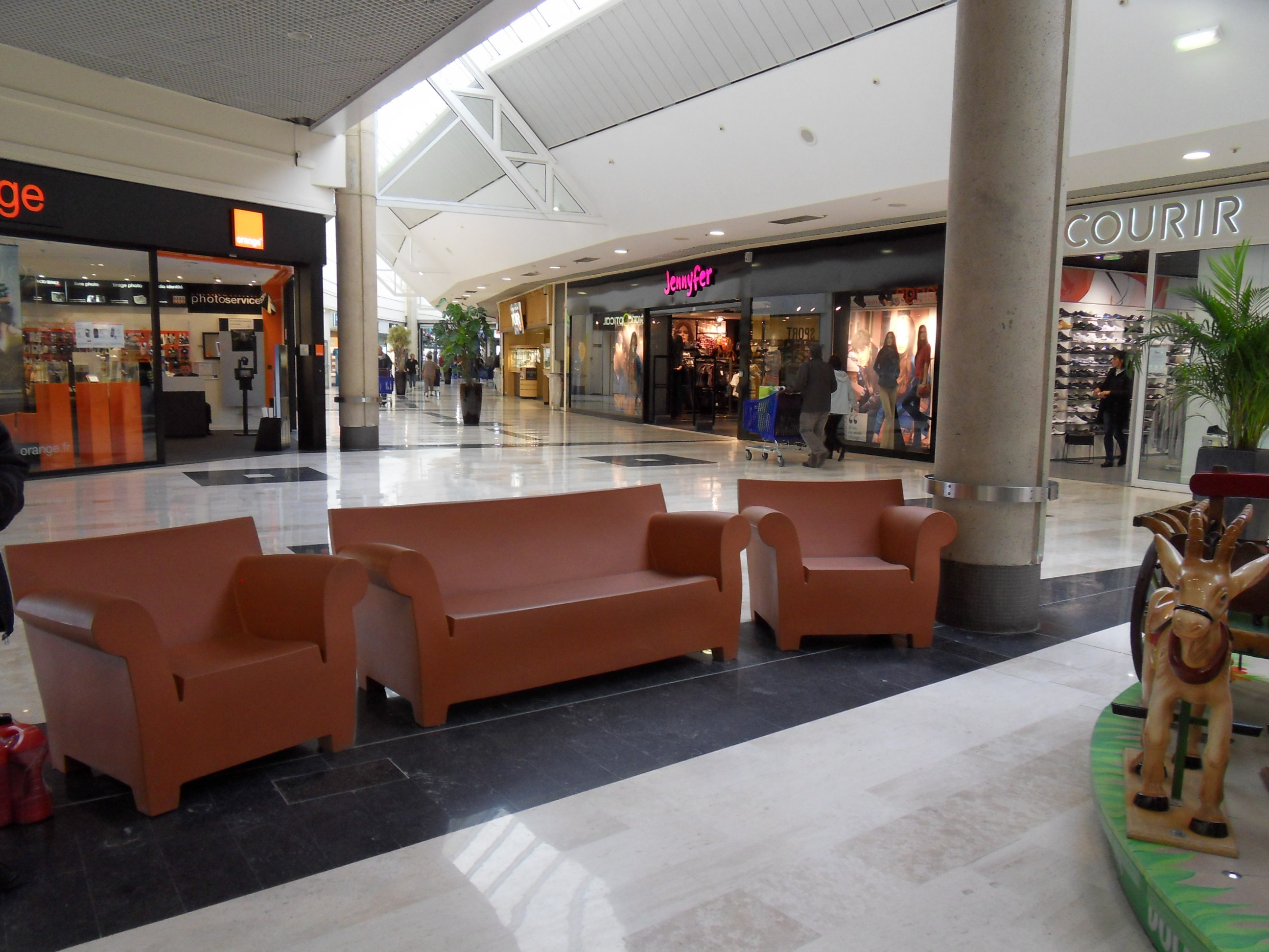 Intérieur galerie Centre Commercial Tourville-la-Rivière.